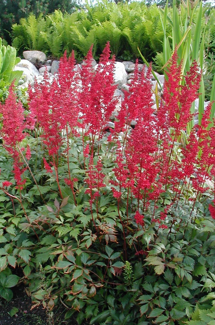 Astilbe x arendsii 'Fanal'.